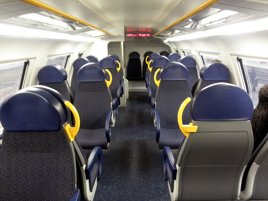 Interno di un Treno Servizio Regionale (TSR) delle Ferrovie Nord Milano, ambiente al piano superiore, sedili del modello della seconda serie